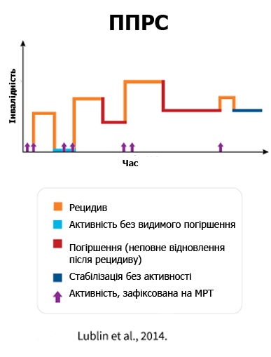 Перебіг первинно-прогресуючого розсіяного склерозу (узагальнений графік): чергування різних стадій захворювання